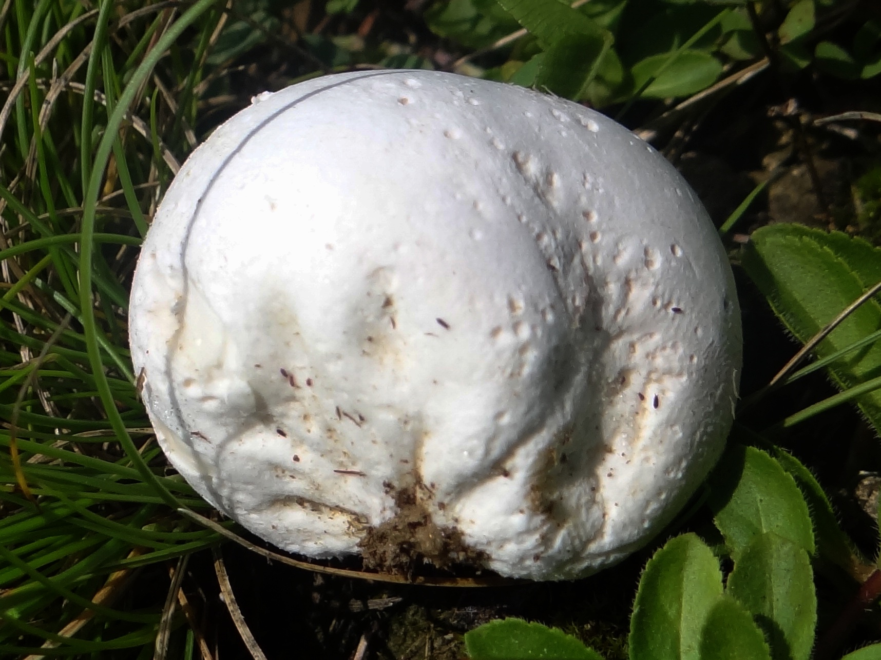 Bovista nigrescens (habitat:Beskid Sądecki, Jaworzyna Krynicka)